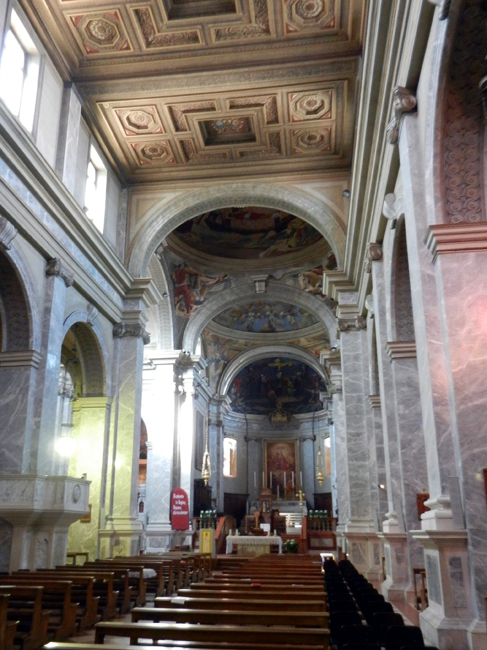 Vittorio Veneto - Interno della Cattedrale di Ceneda